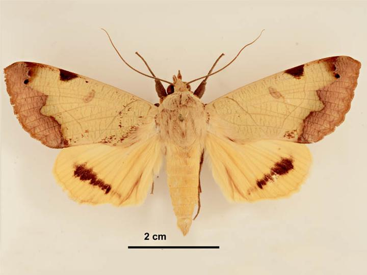 Ophiusa tirhaca male, dorsal view